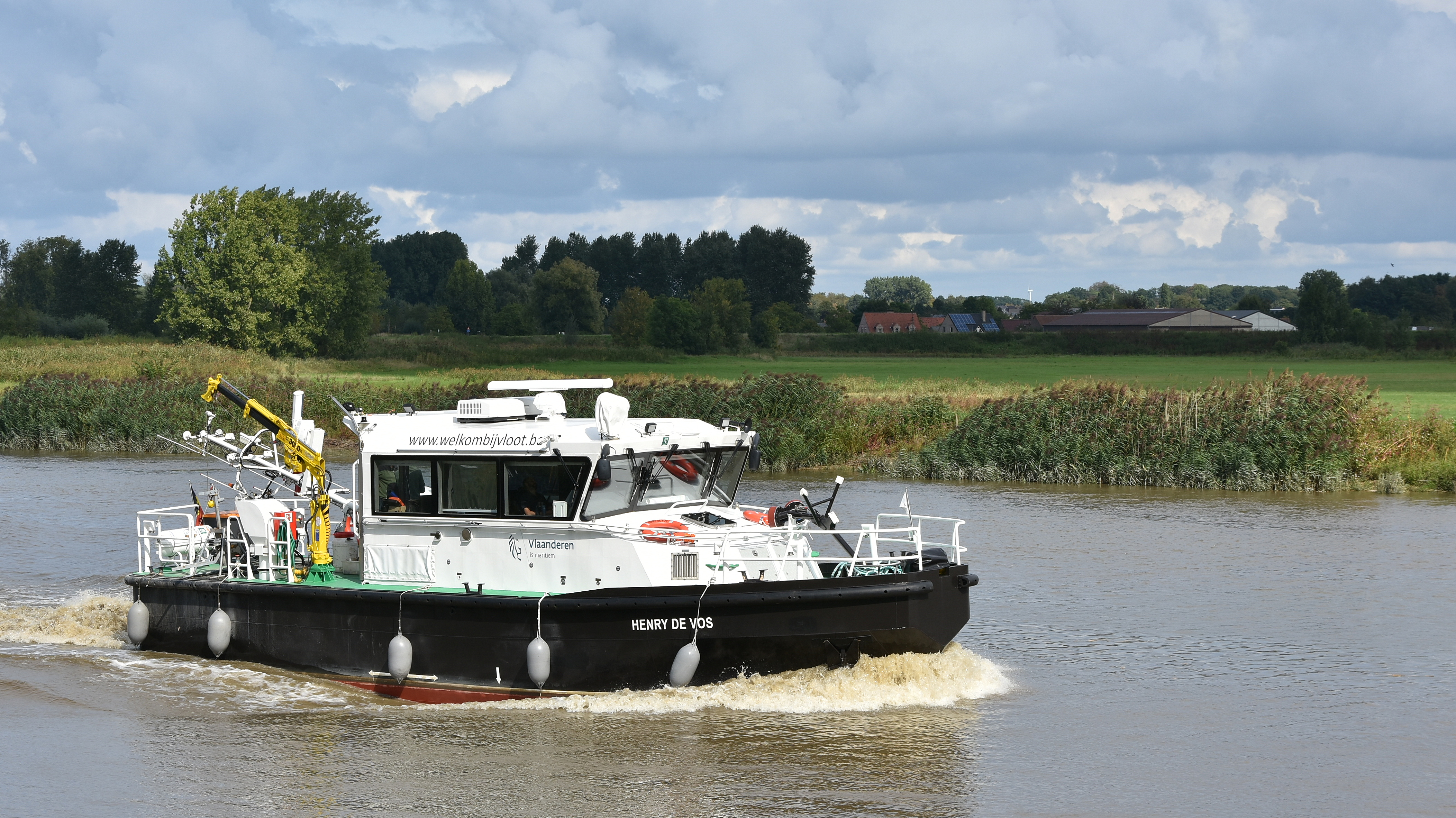 Henry De Vos (DAB Vloot) hydrografisch vaartuig op de Schelde te Uitbergen 6-09-2018 This photo of movable heritage has been taken in the Flemish Region